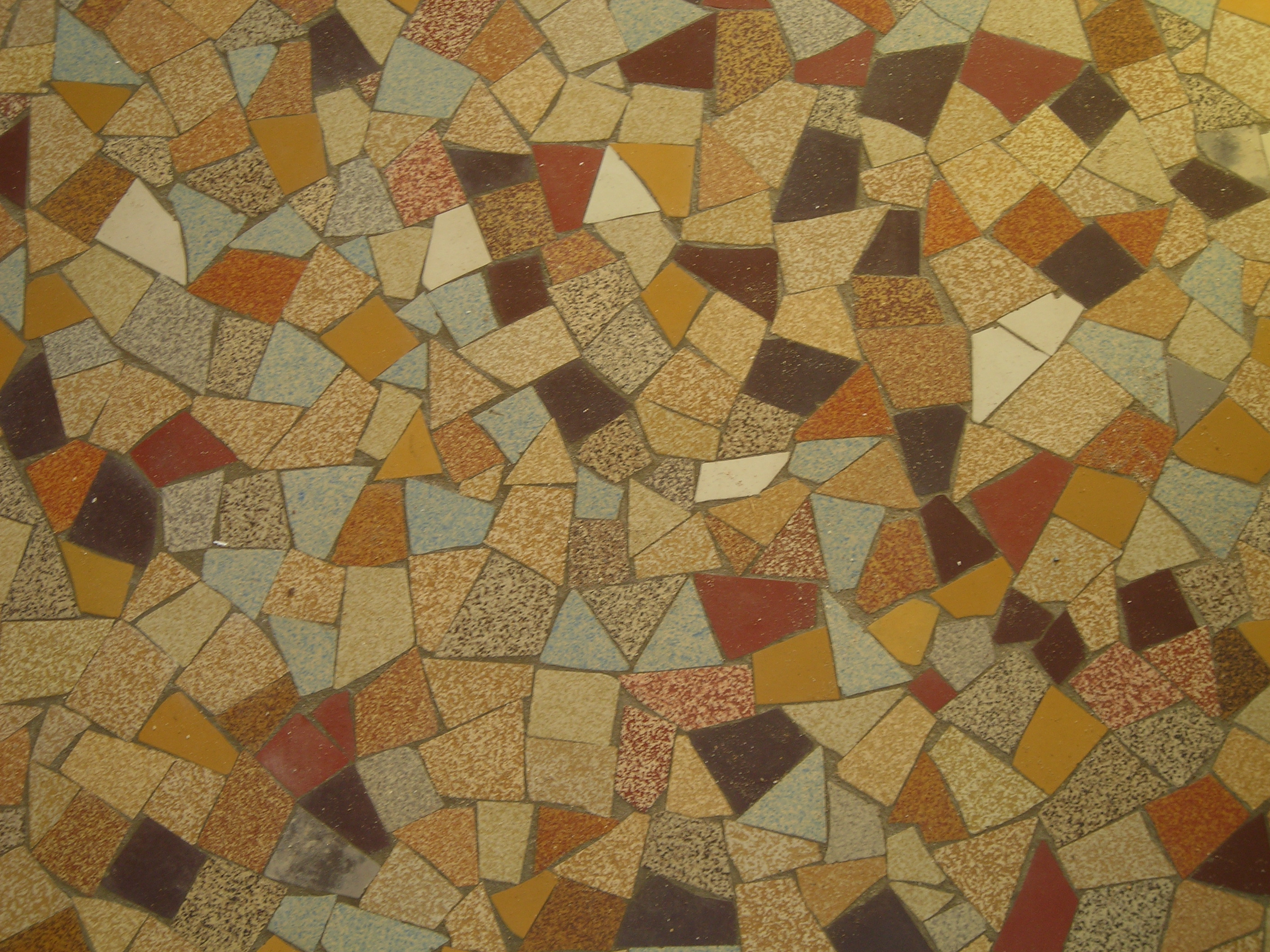 Carrelage multi-tasseaux. Opus incertum en grès céramique.